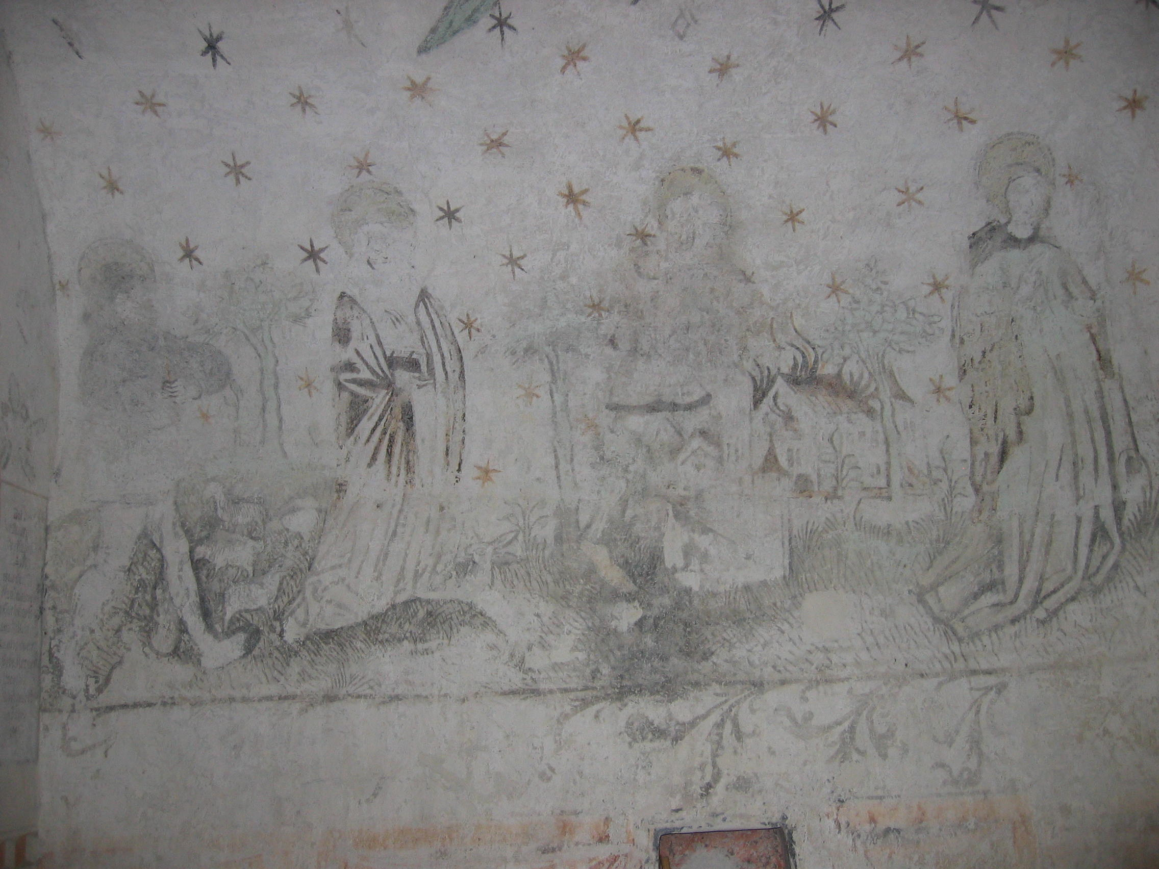 Burg Ramsberg - Heiligenfreis in Kapelle St. Wendelin